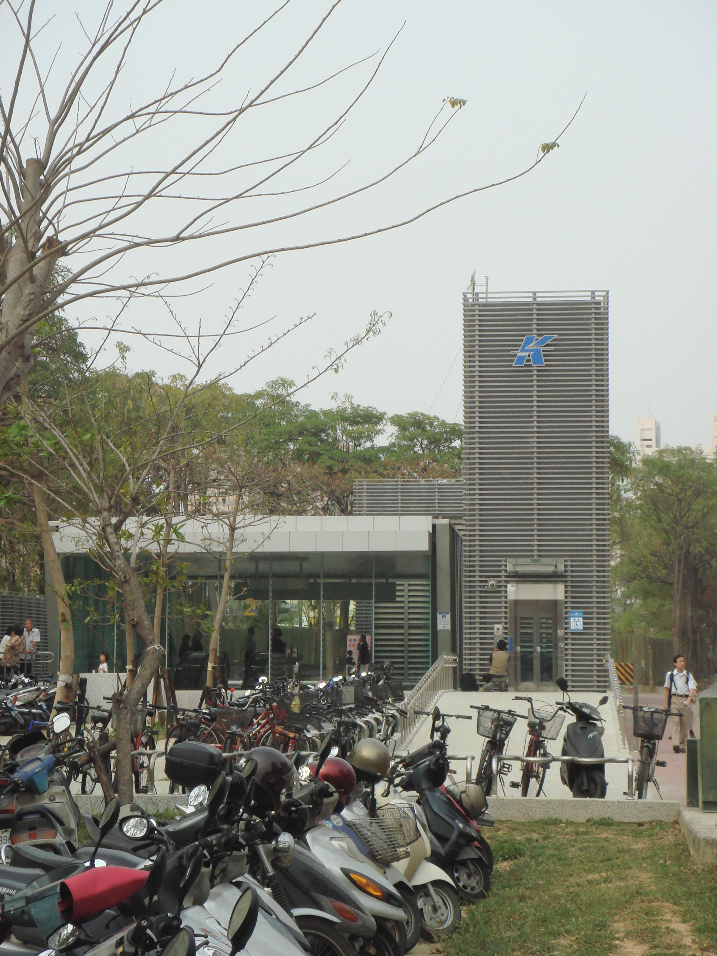 中文（台灣）: 高雄捷運生態園區站博愛公園無障礙電梯出口。